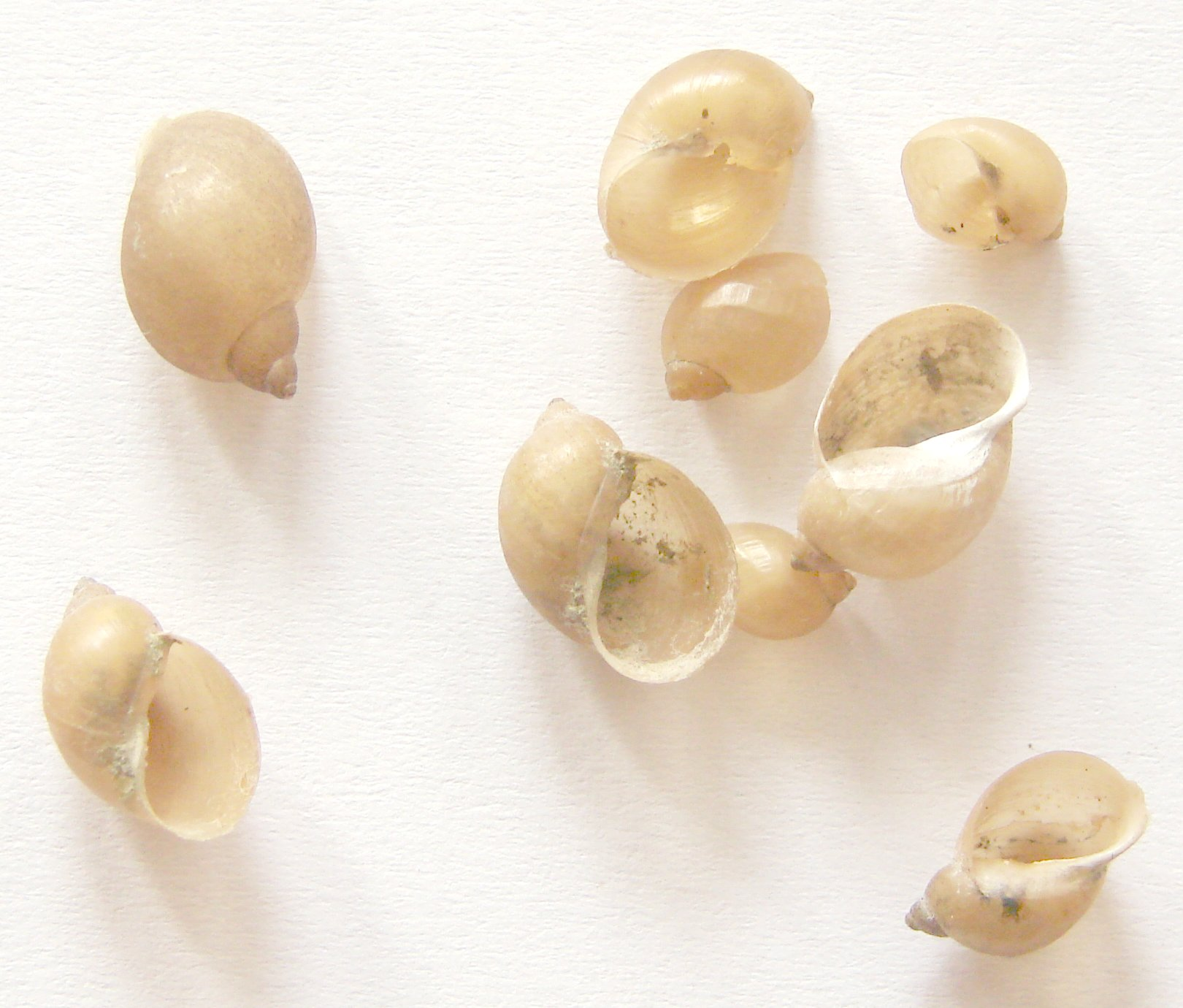 Limnaea peregra var. ovata and var. typica